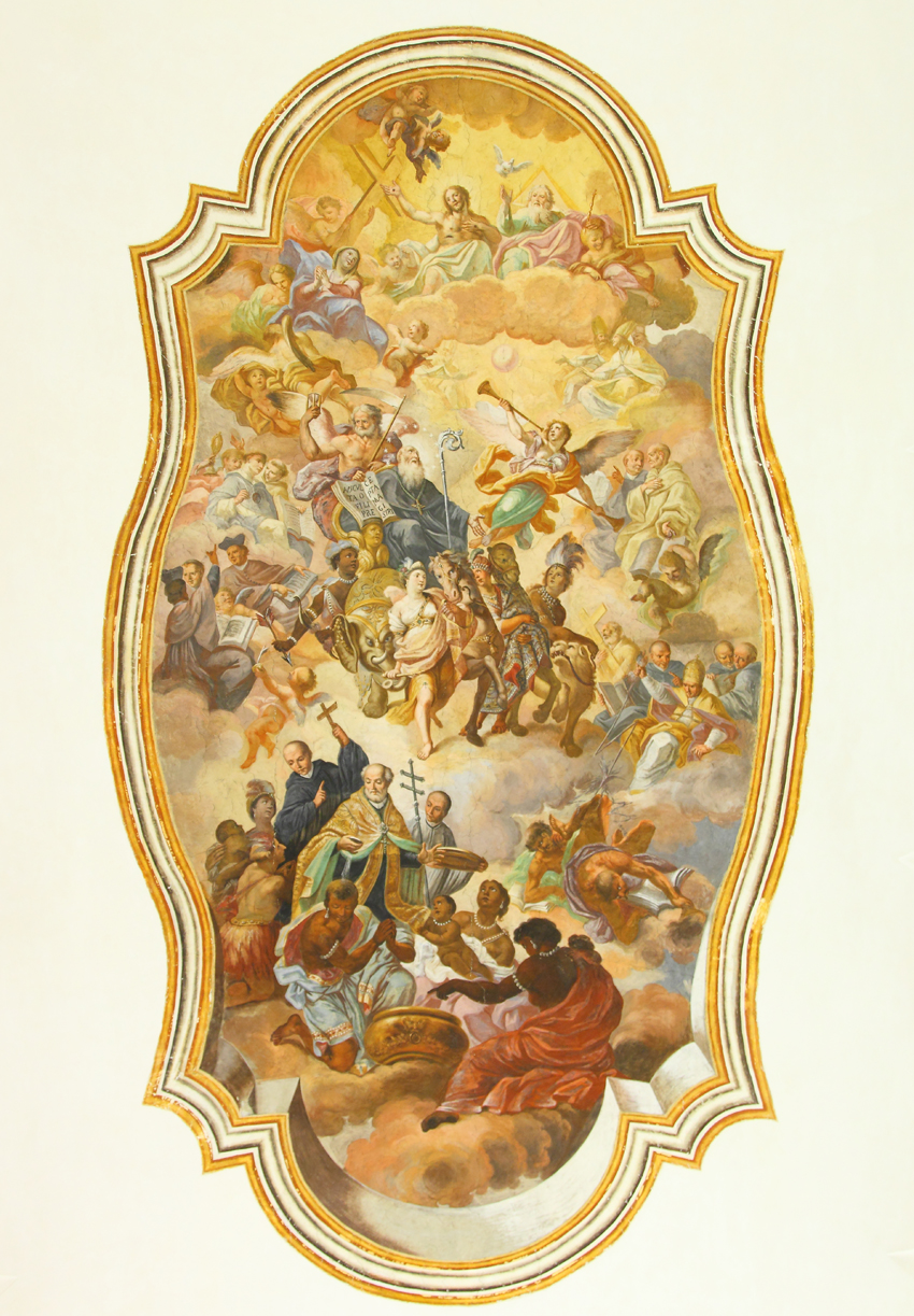 la "Gloria di San Benedetto" è una delle poche testimonianze pittoriche salvatesi dagli innumerevoli terremoti che hanno interessato il monastero di San Nicolò l'Arena di Catania. Il gigantesco affresco è visibile sull'ampia volta del cosiddetto "refettorio grande", dove praticamente i monaci consumavano i pasti.